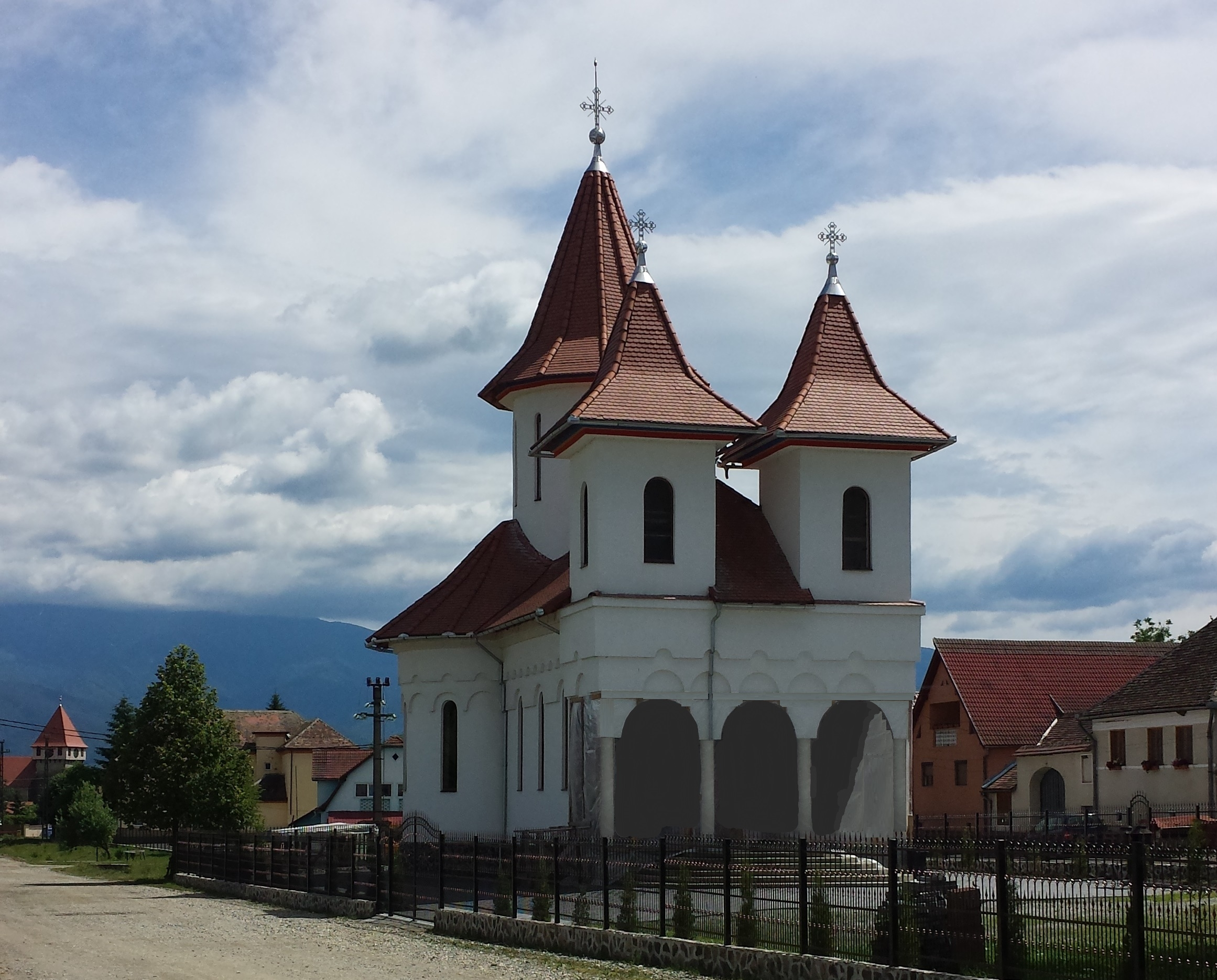 Gebaut 2013-2016